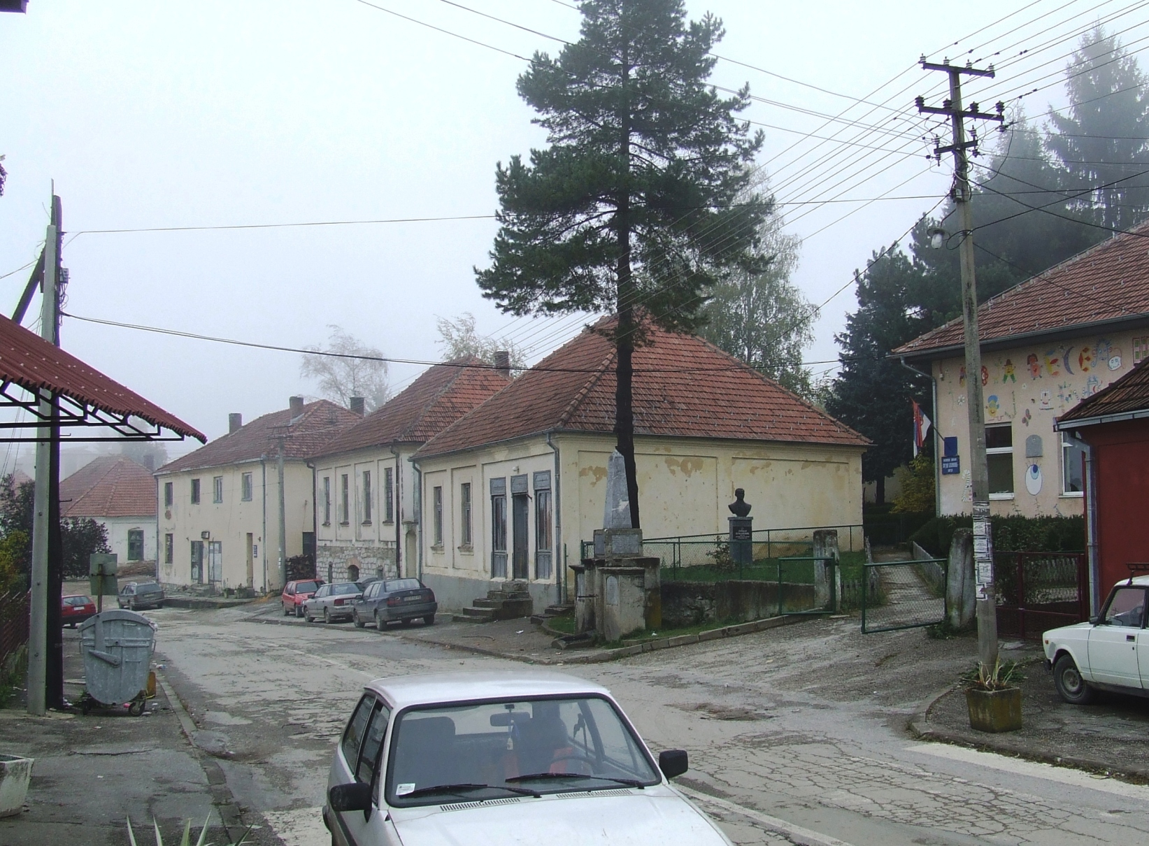 Варда, Косјерић.